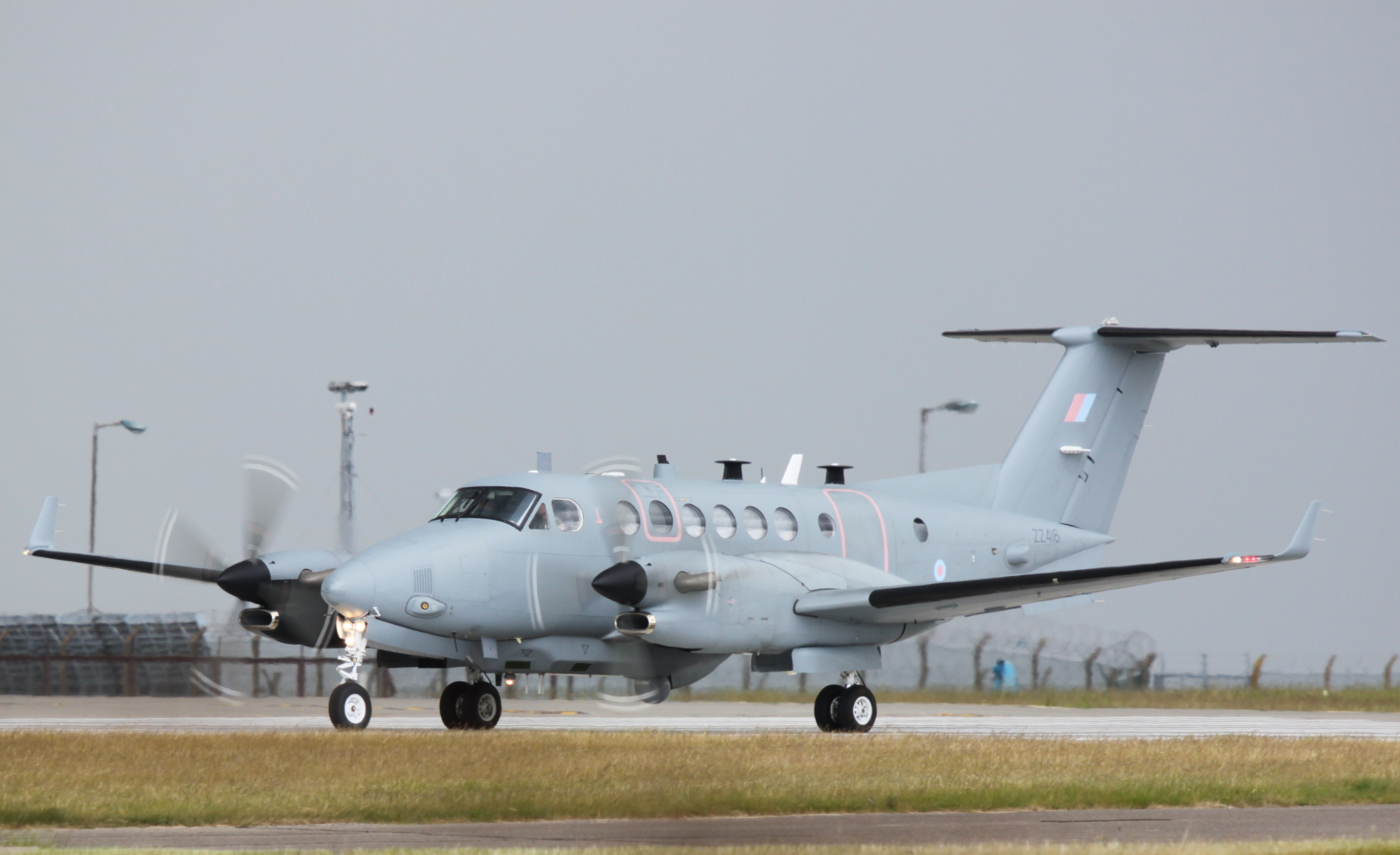 Super secret!